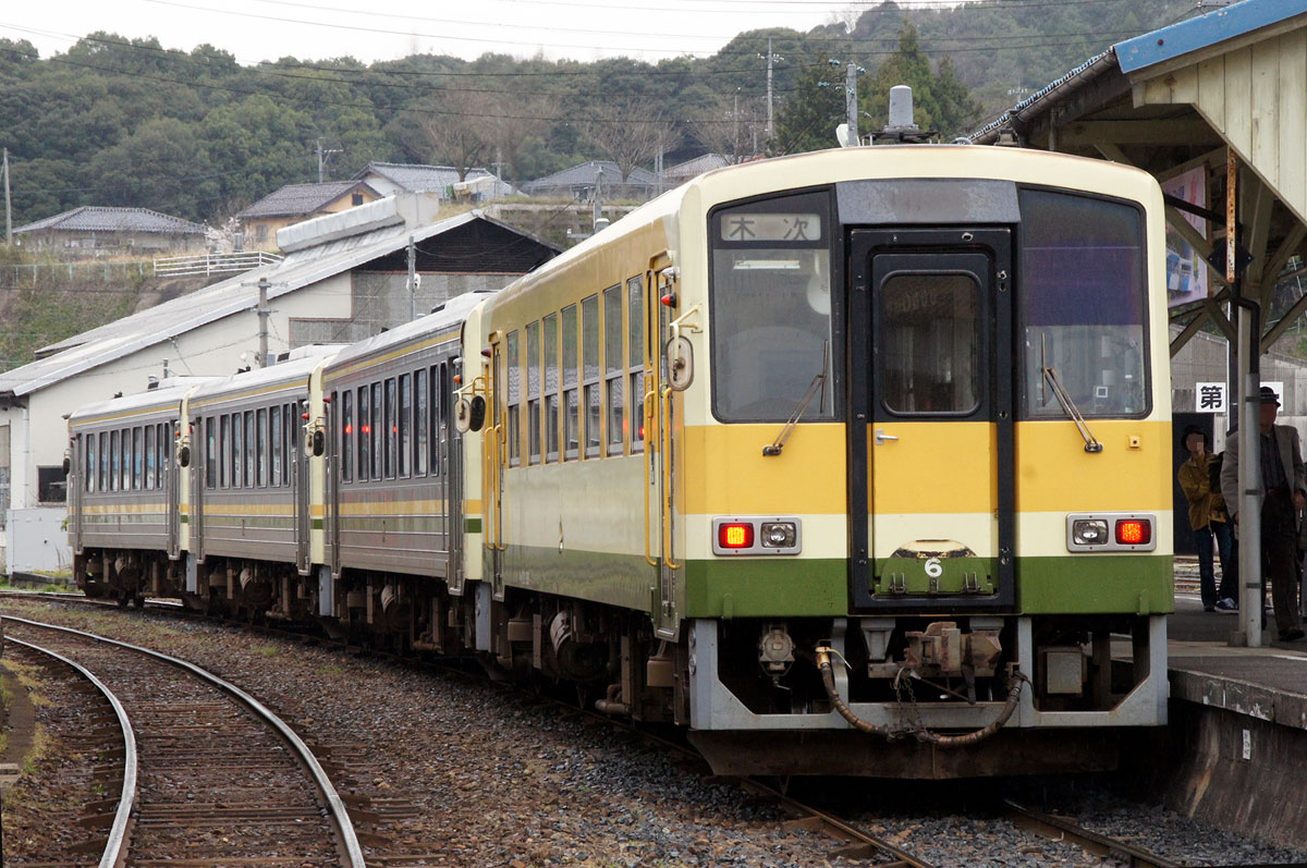 JR西日本 キハ120形（木次線）